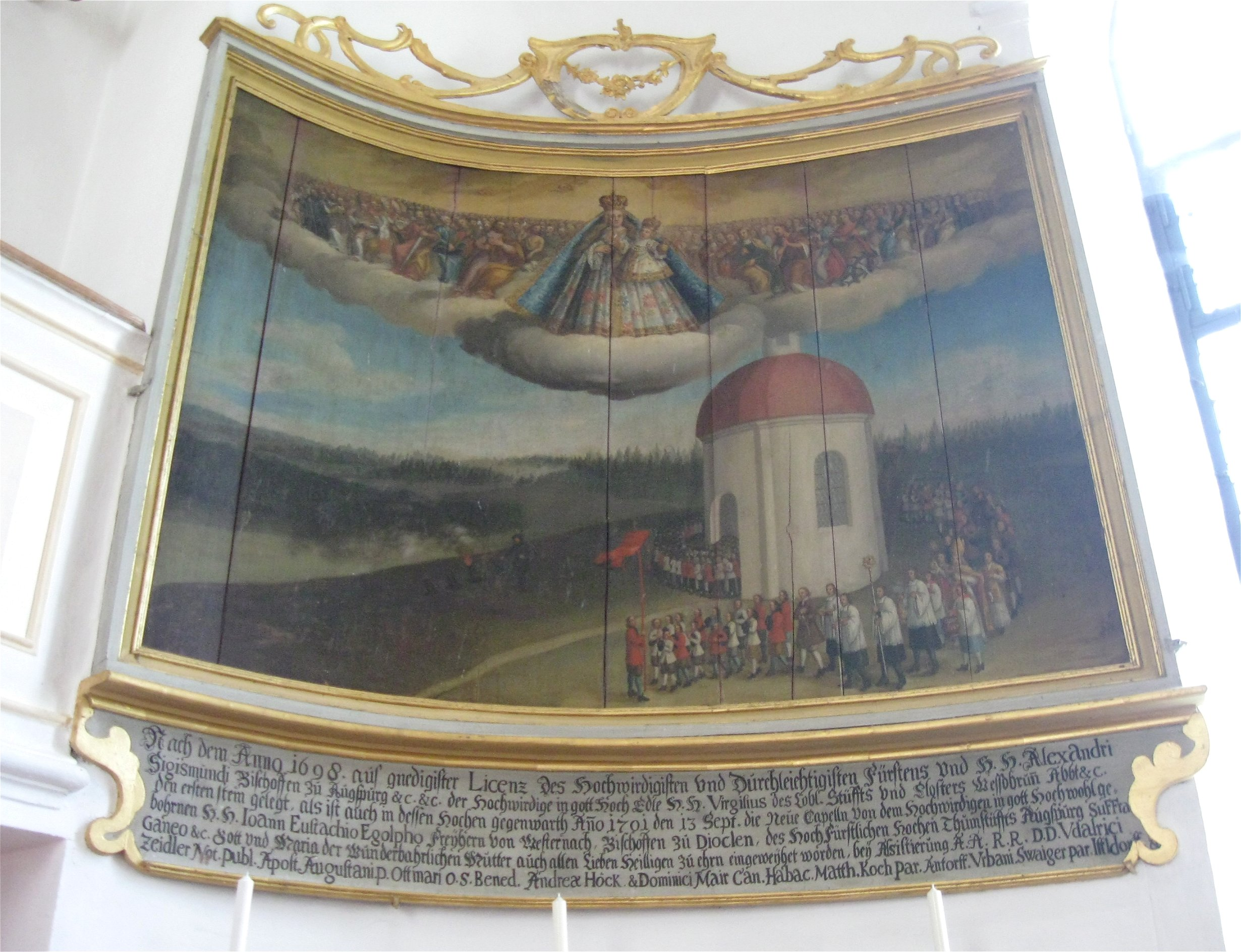 Heuwinklstraße 58, Iffeldorf; Kath. Wallfahrtskapelle St. Maria, Heuwinklkapelle, Runder Zentralbau von Johann Schmuzer, 1698 ff.; mit Ausstattung. Großes Votivbild